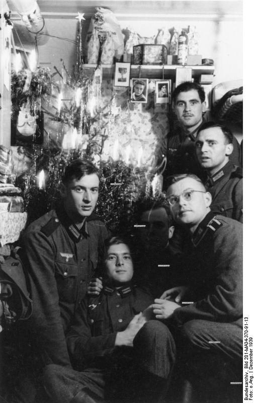 Soldatenweihnacht mit Weihnachtsbaum Im Bunker, Weihnachten 1939; v. links: Gefr. Kemper, Blattmann, Sick (im Schatten der Tanne), Uffz. Gieseke, Gefr. Rick, Gefr. Horlacher [Album zur Landwehr-Artillerie-Abteilung 14 (Ldw.Art.Abt. 14).- Weihnachtsfeier mit beleuchtetem und geschmückten Tannenbaum]